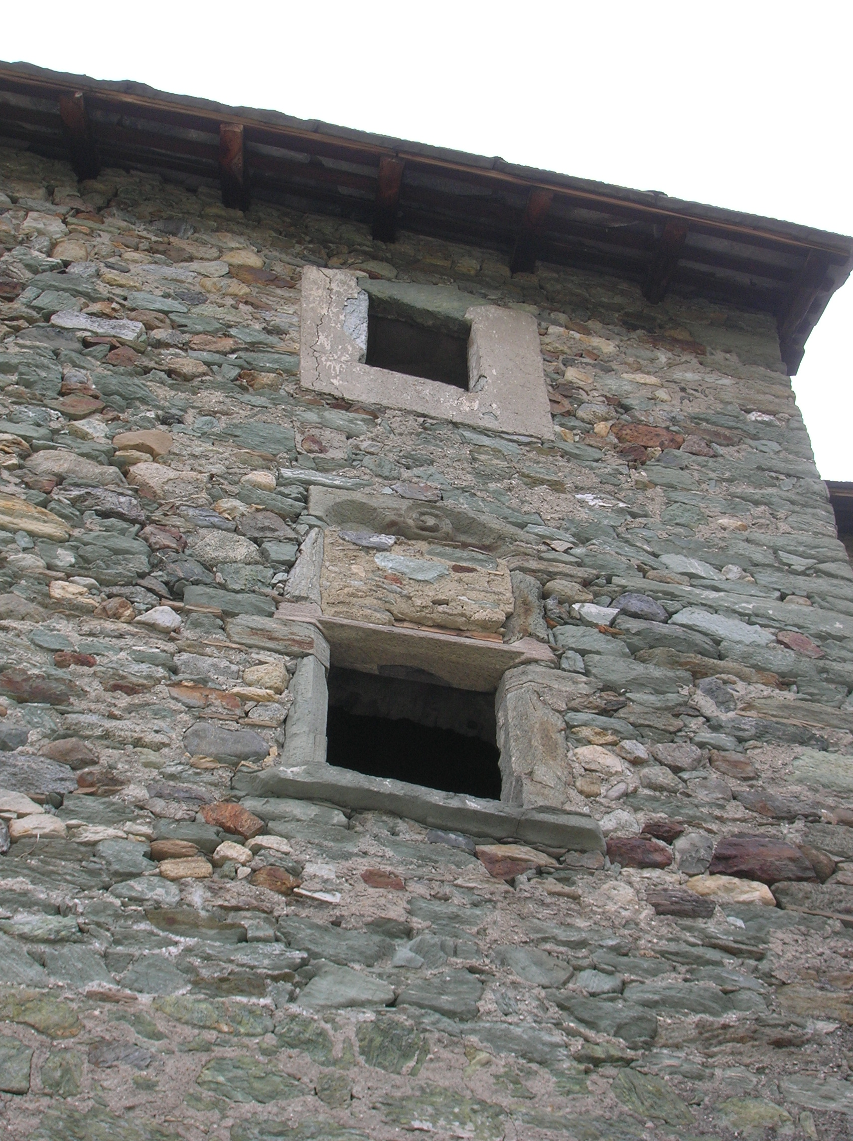 torre della Casaforte di Povil, in località Povil, a Quart, Valle d'Aosta, Italia.